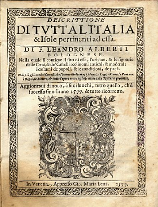 Descrittione di tutta Italia, nella quale si contiene il sito di essa, l'origine, et le Signorie delle Città et delle Castella, Venezia 1575